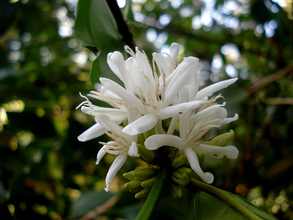 Coffee flower